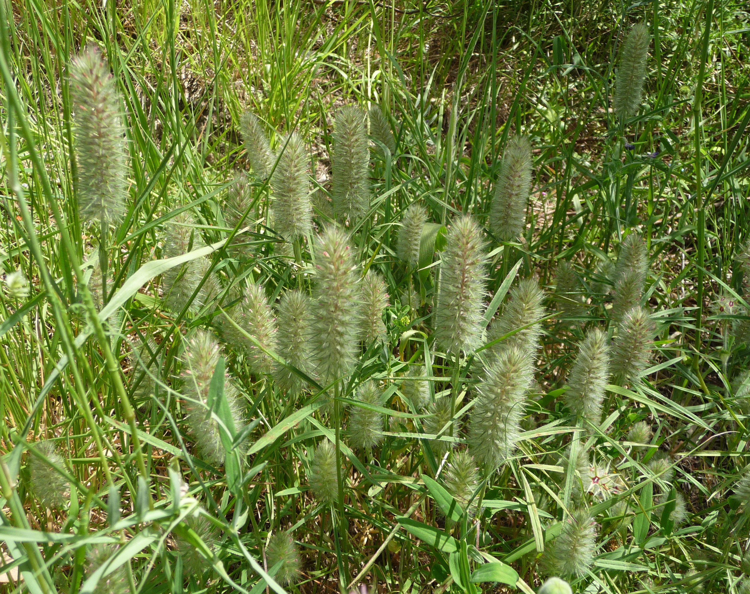 Trifolium angustifolium, bei Livorno, Toskana